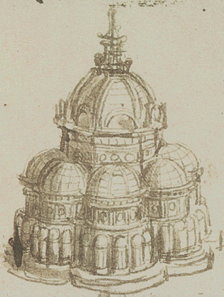 Chiesa a pianta centrale con cappelle per gemmazione, particolare da un manoscritto di Leonardo da Vinci.